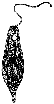 Euglena viridis